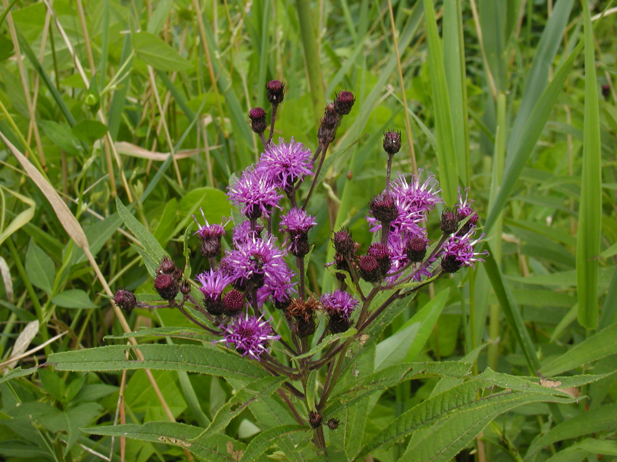 Vernonia noveboracensis